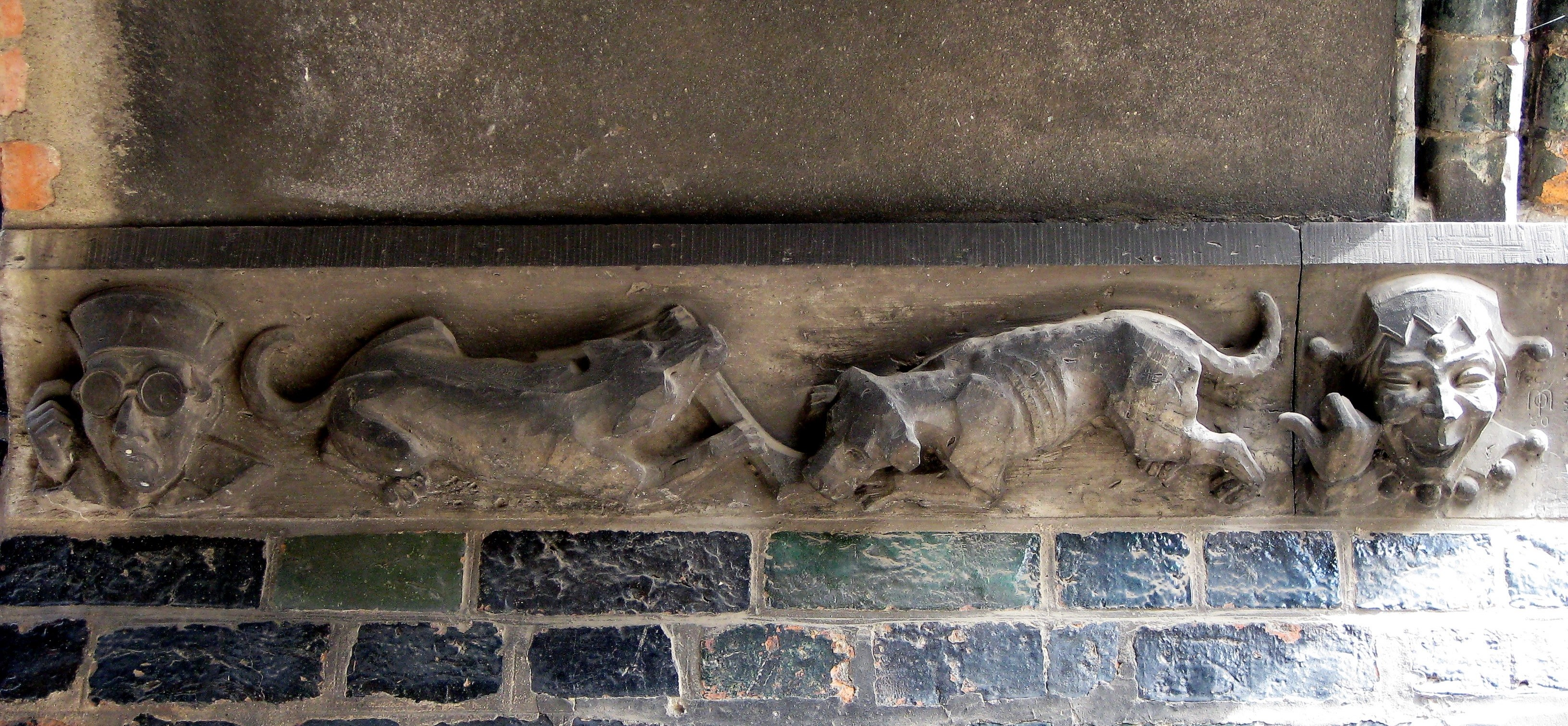 Skulpturen im Durchgang von der Breiten Straße zwischen Rathaus und Kanzleigebäude.